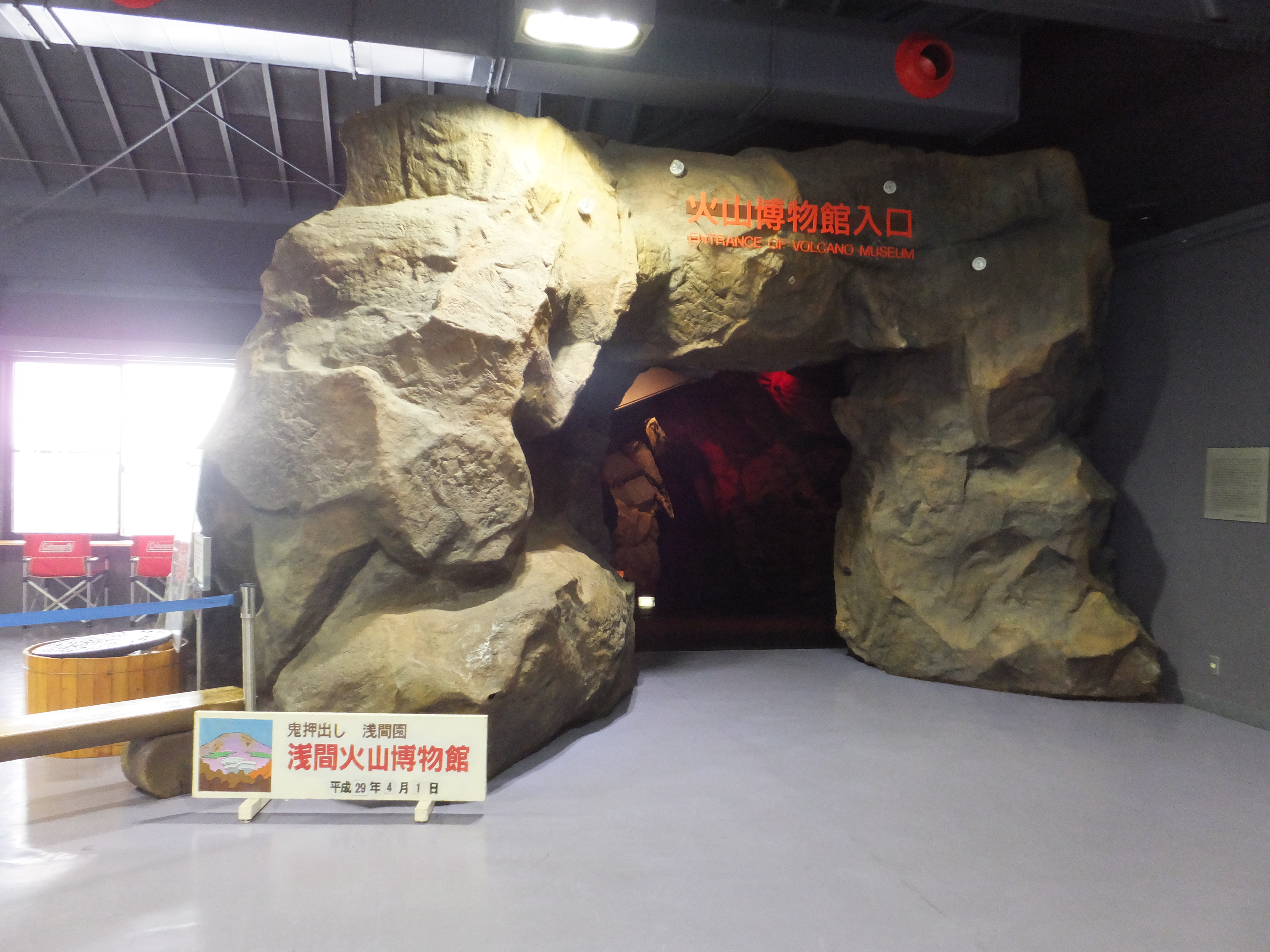 鬼押出し・浅間園にある浅間火山博物館入口。2017年4月1日撮影。